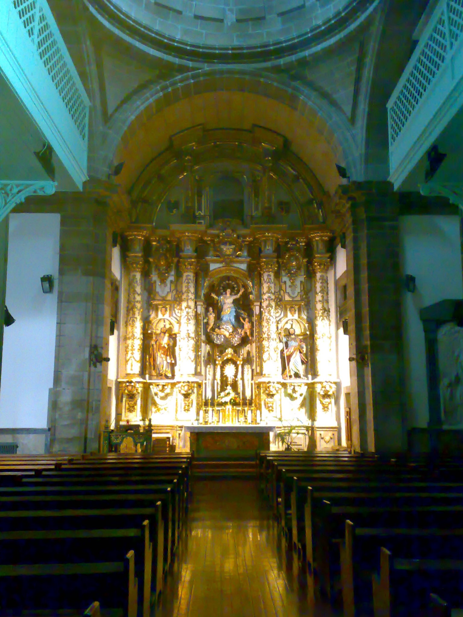 Interior da Igrexa das Orfas (Santiago de Compostela), co altar maior ao fondo.